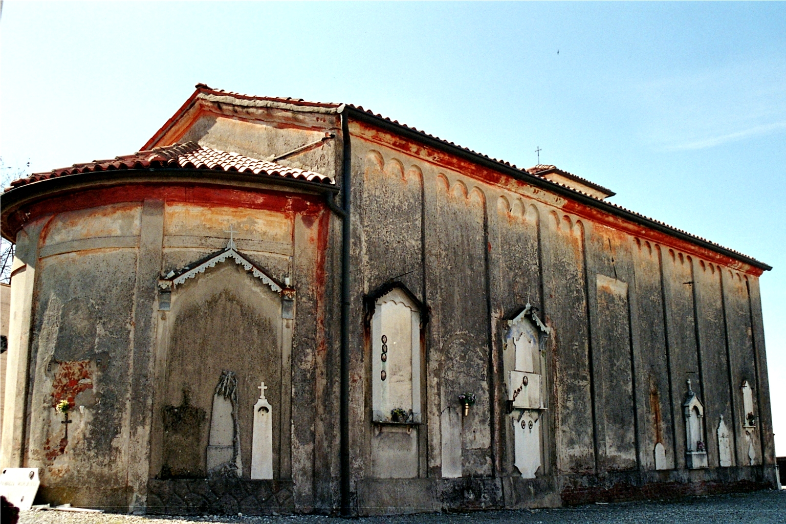 Fara Novarese (NO), Chiesa di San Pietro e San Paolo: esterno, zona absidale